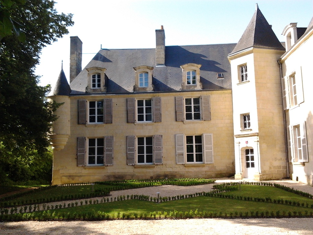 Oostelijke vleugel van Château d'isore in 2012